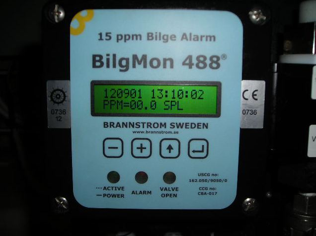 Монитор OCM